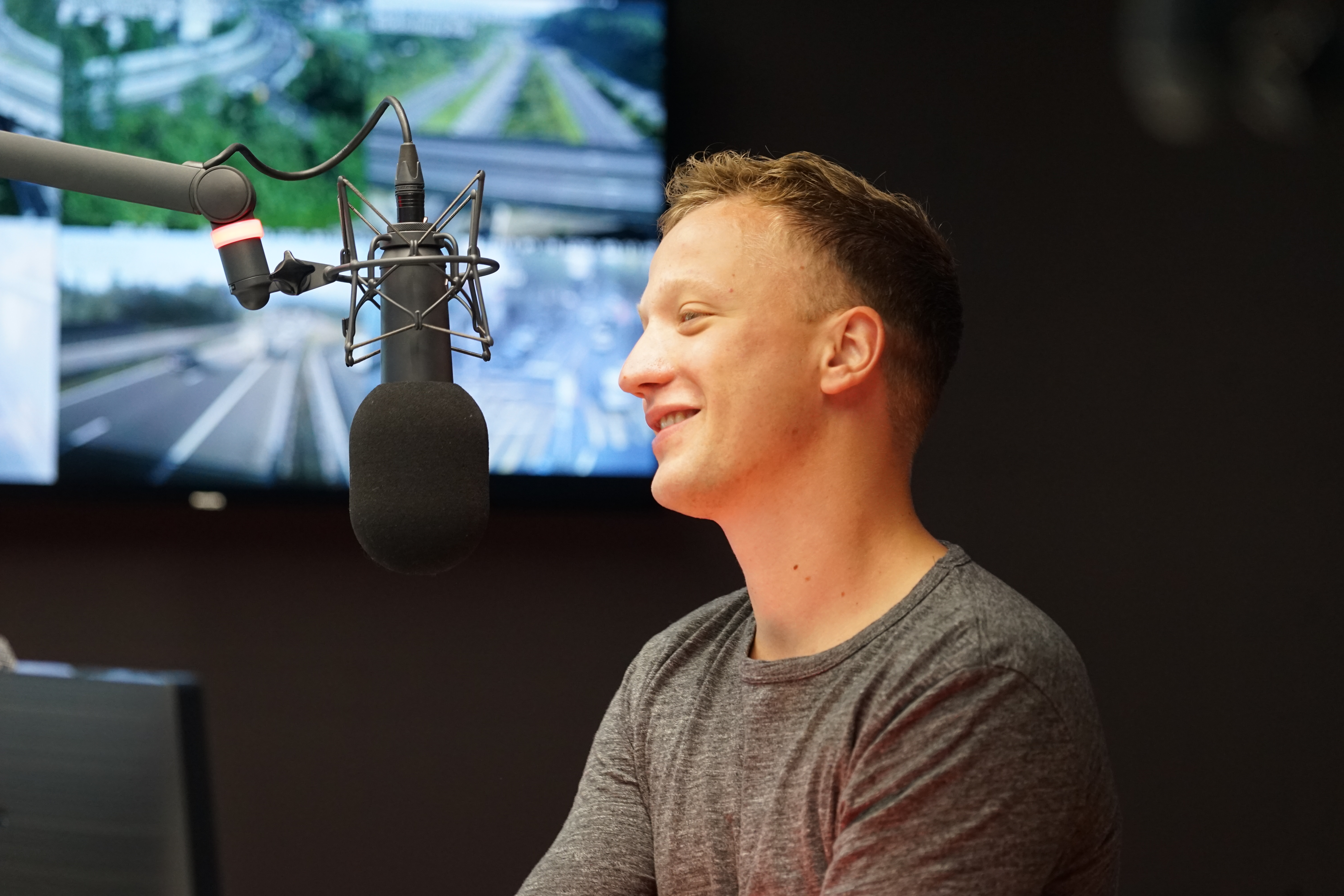 Joris im Radio Pilatus Interview